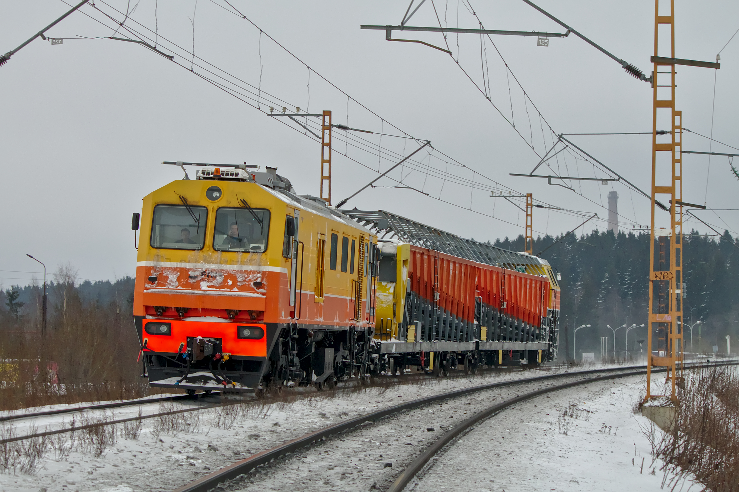 Тепловоз (тягово-энергетическая секция) ТЭС ПСС1К в составе снегоуборочного поезда ПСС1К